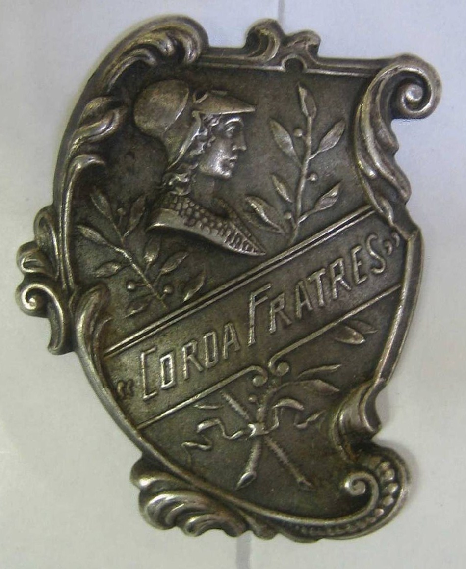 Insigne de la Corda Fratres avers.